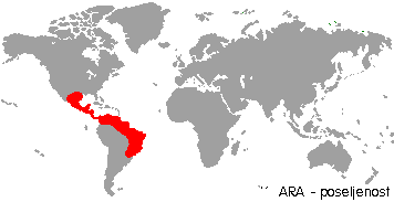 Razširjenost are. Avtor Uporabnik:Lander. Licenca GFDL.